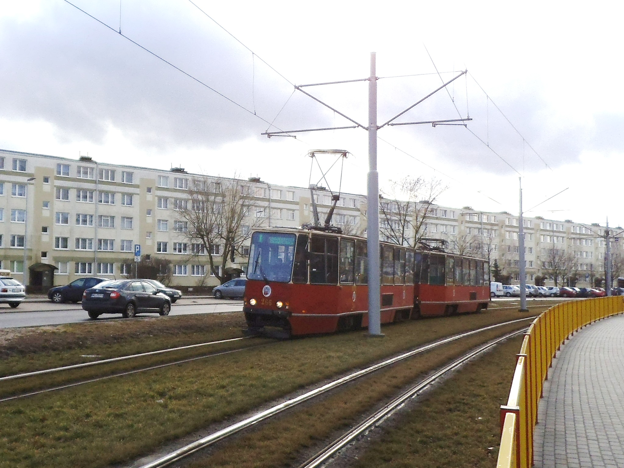 Tramwaj na Bielanach